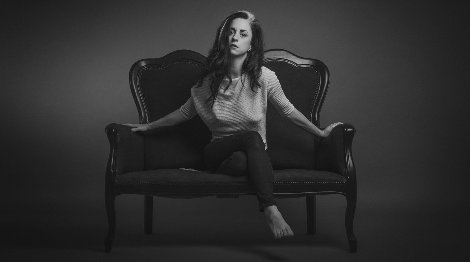 Tess Wiley (2016). Foto: Stephan Klement